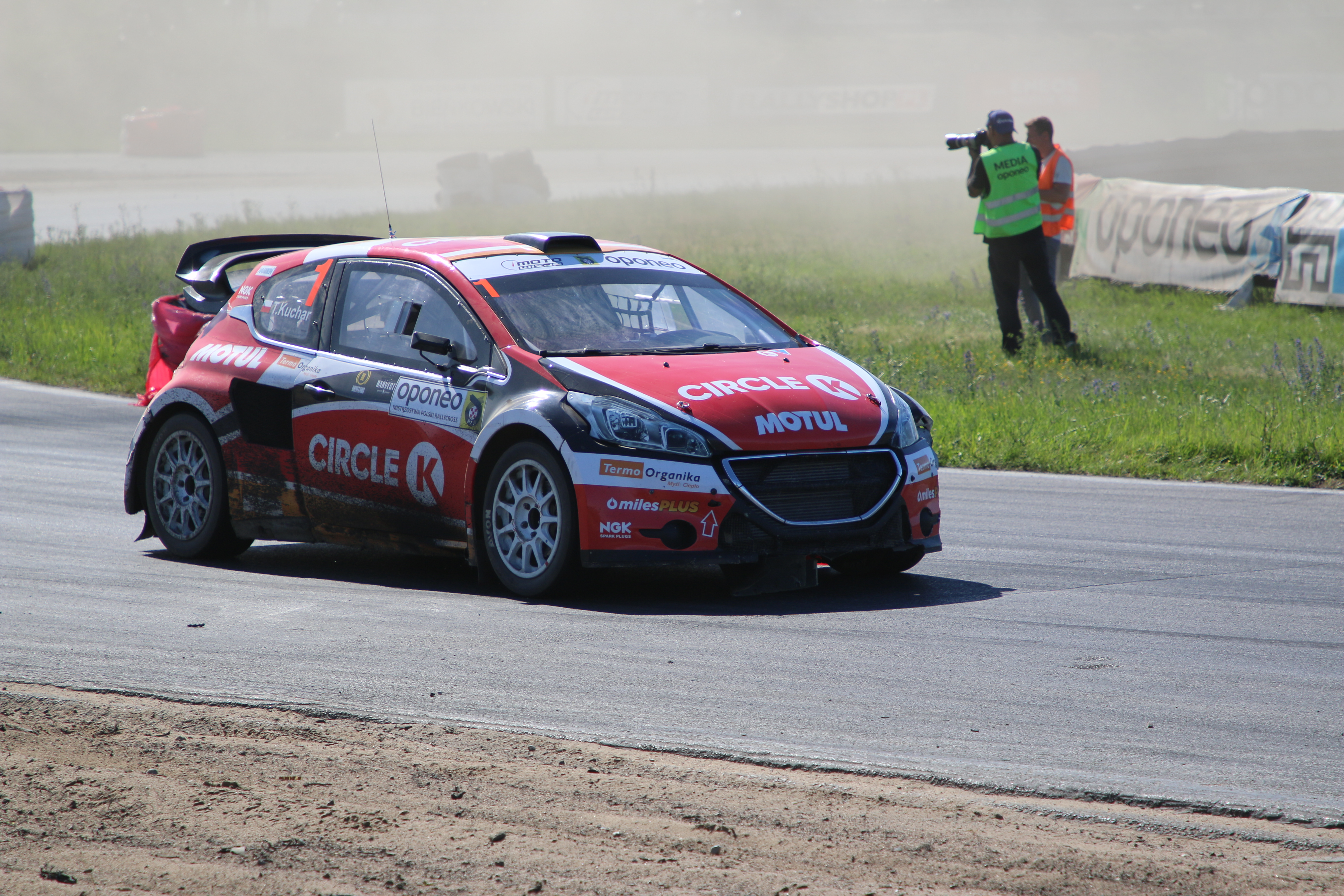 4 Runda OPONEO Mistrzostw Polski Rallycross - Toruń, Tomasz Kuchar